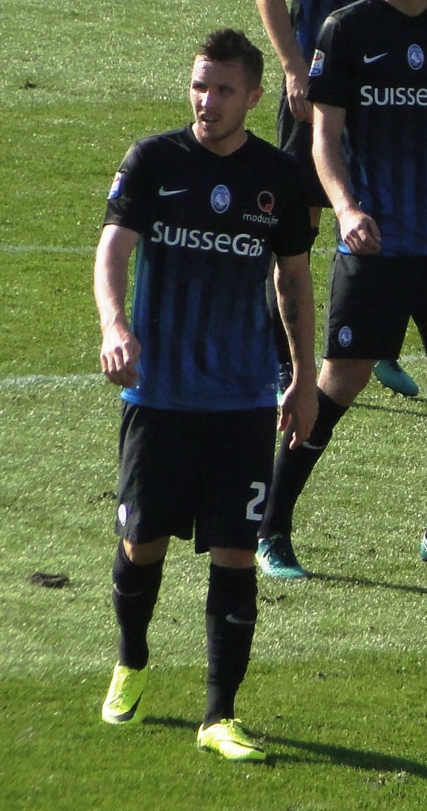 Jasmin Kurtić, calciatore sloveno